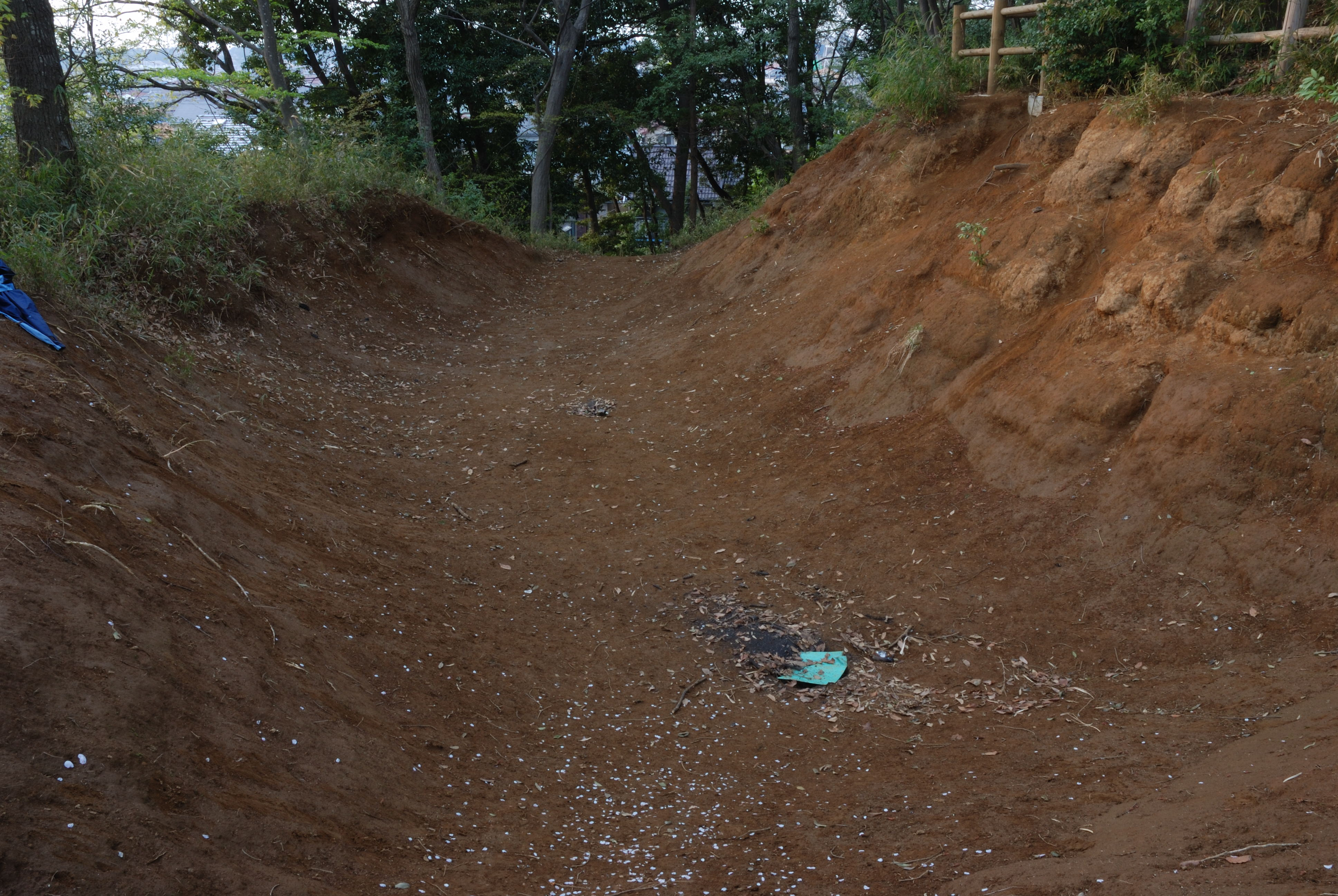 Kogane castle unebori